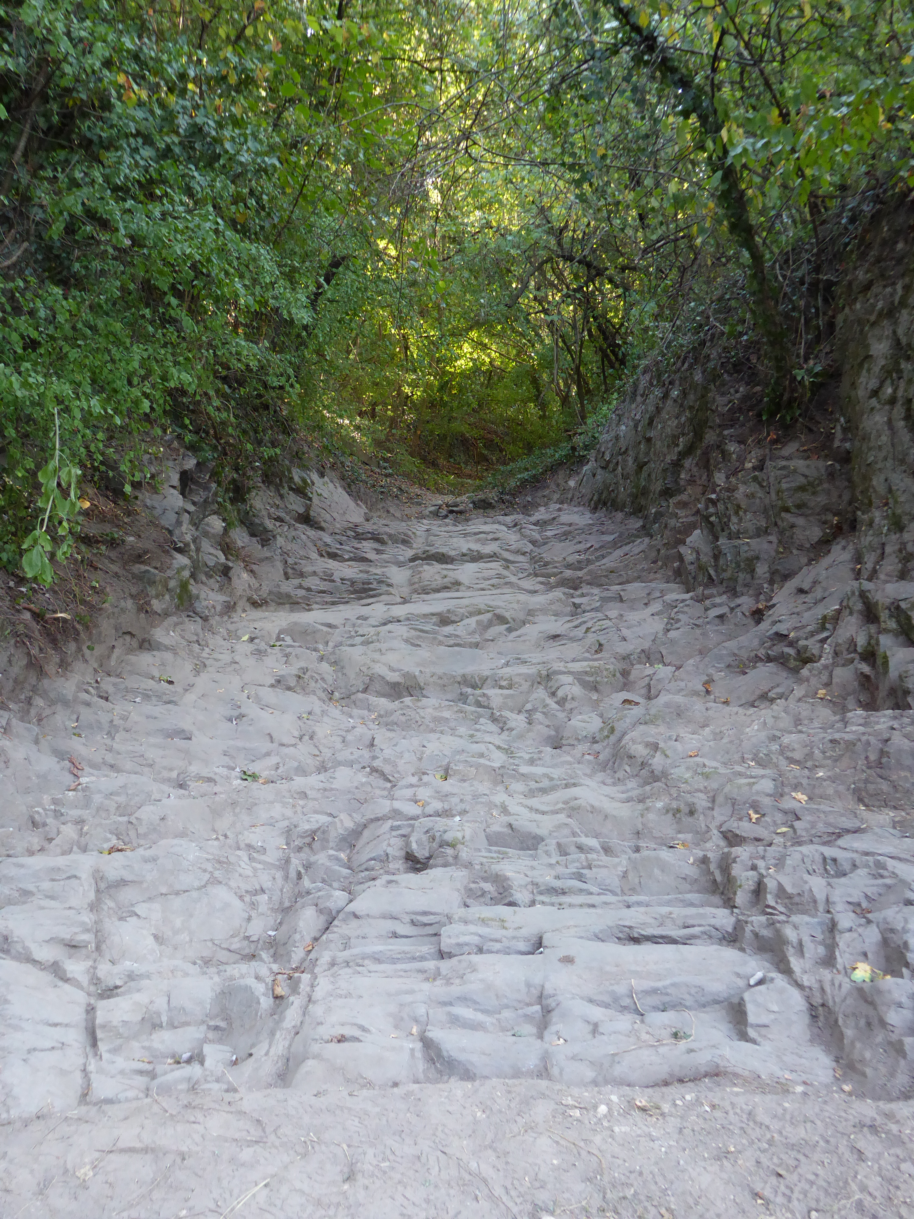 Römerstraße im Süden von Mauternbach, Mautern, Niederösterreich - freigelegt anlässlich des Tages des Denkmals 25. September 2016